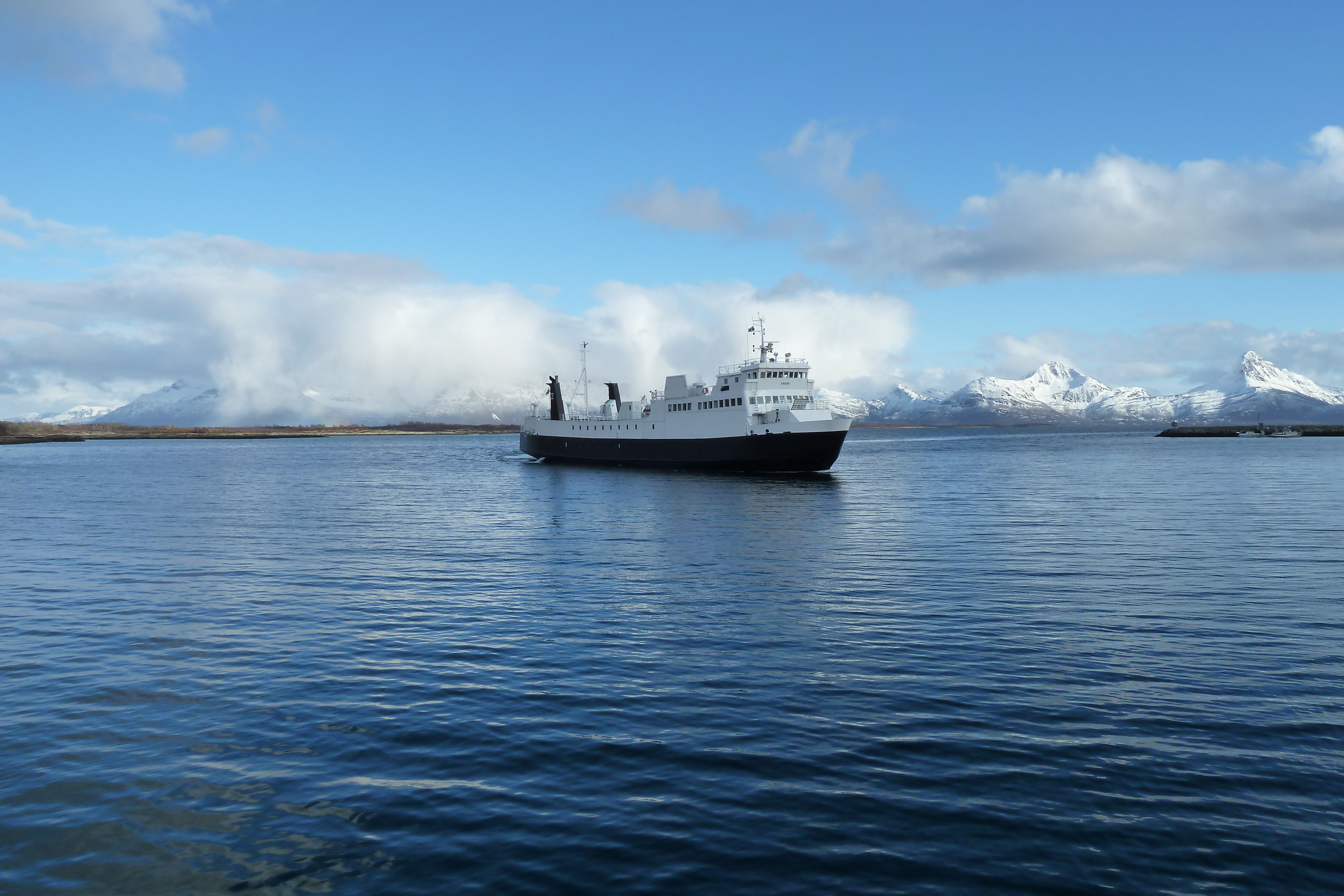 MF Vågan (senere Baldur - IMO 7804962) på vei inn i kaia på Skutvik, Hamarøy.